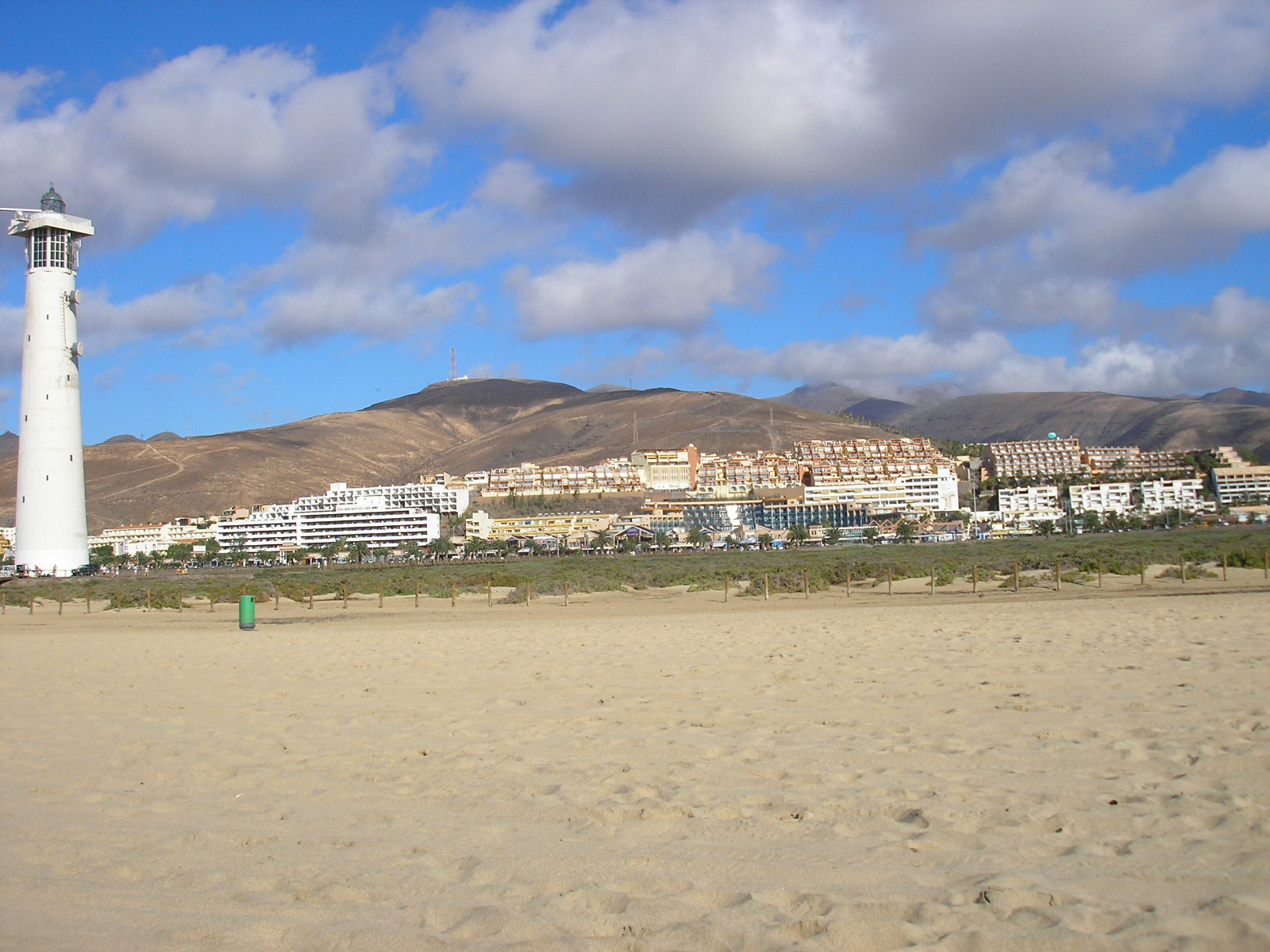 Jandia Playa bei Morro Jable auf Fuerteventura